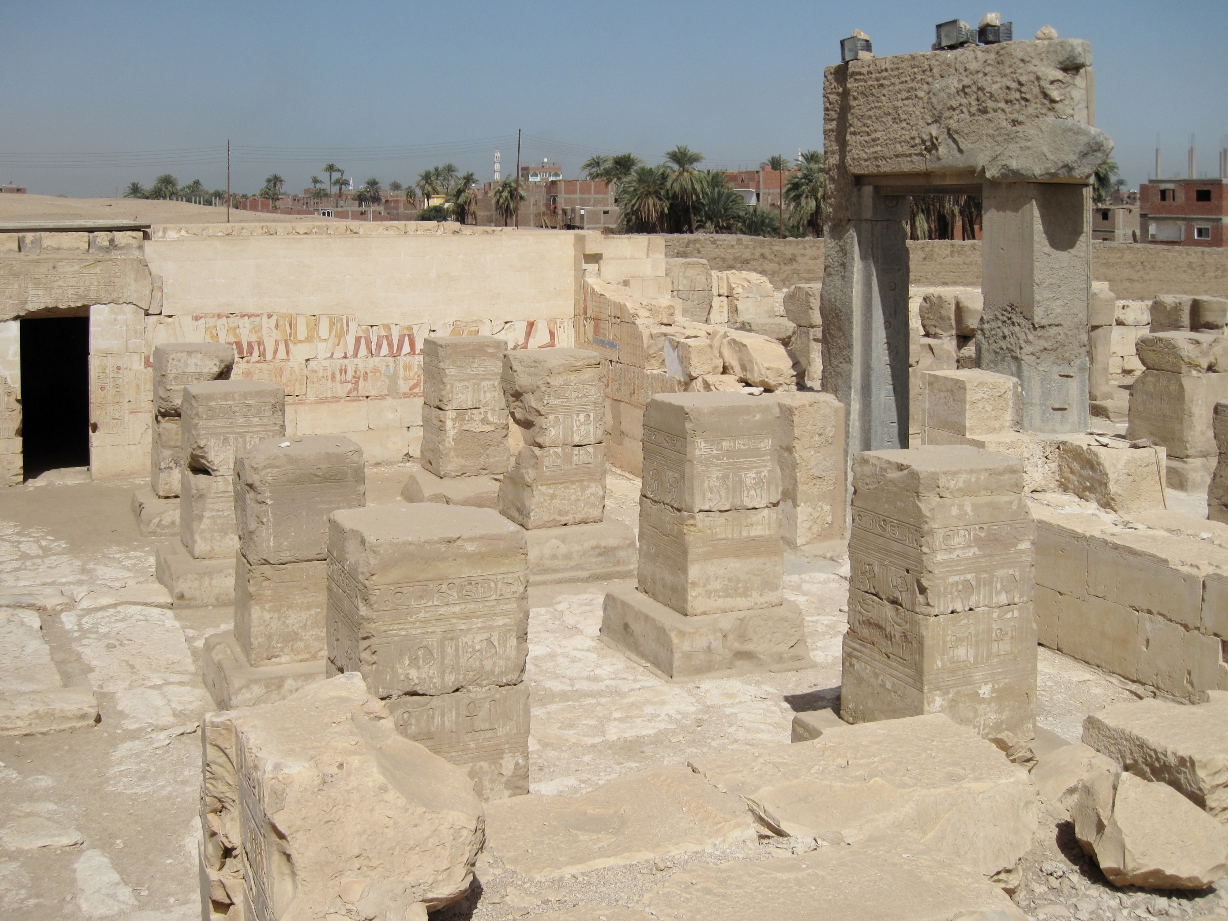 Erste Hypostylhalle im Tempel Ramses II. in Abydos, Ägypten